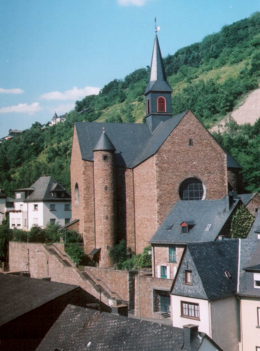 St. Remaclus in Cochem-Cond von Südwesten